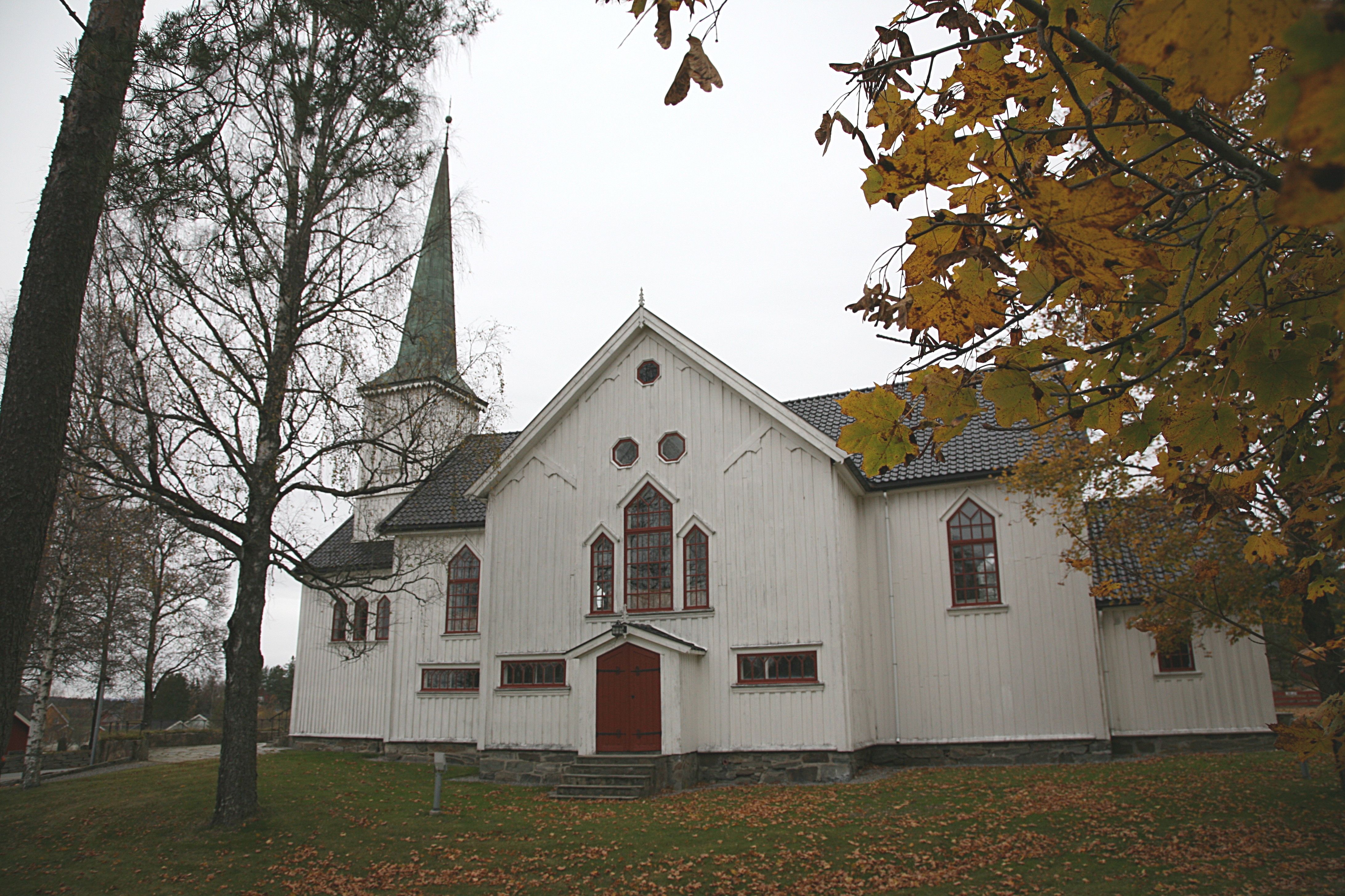 Båstad kirke. Church in Trøgstad, Østfold, Norway.